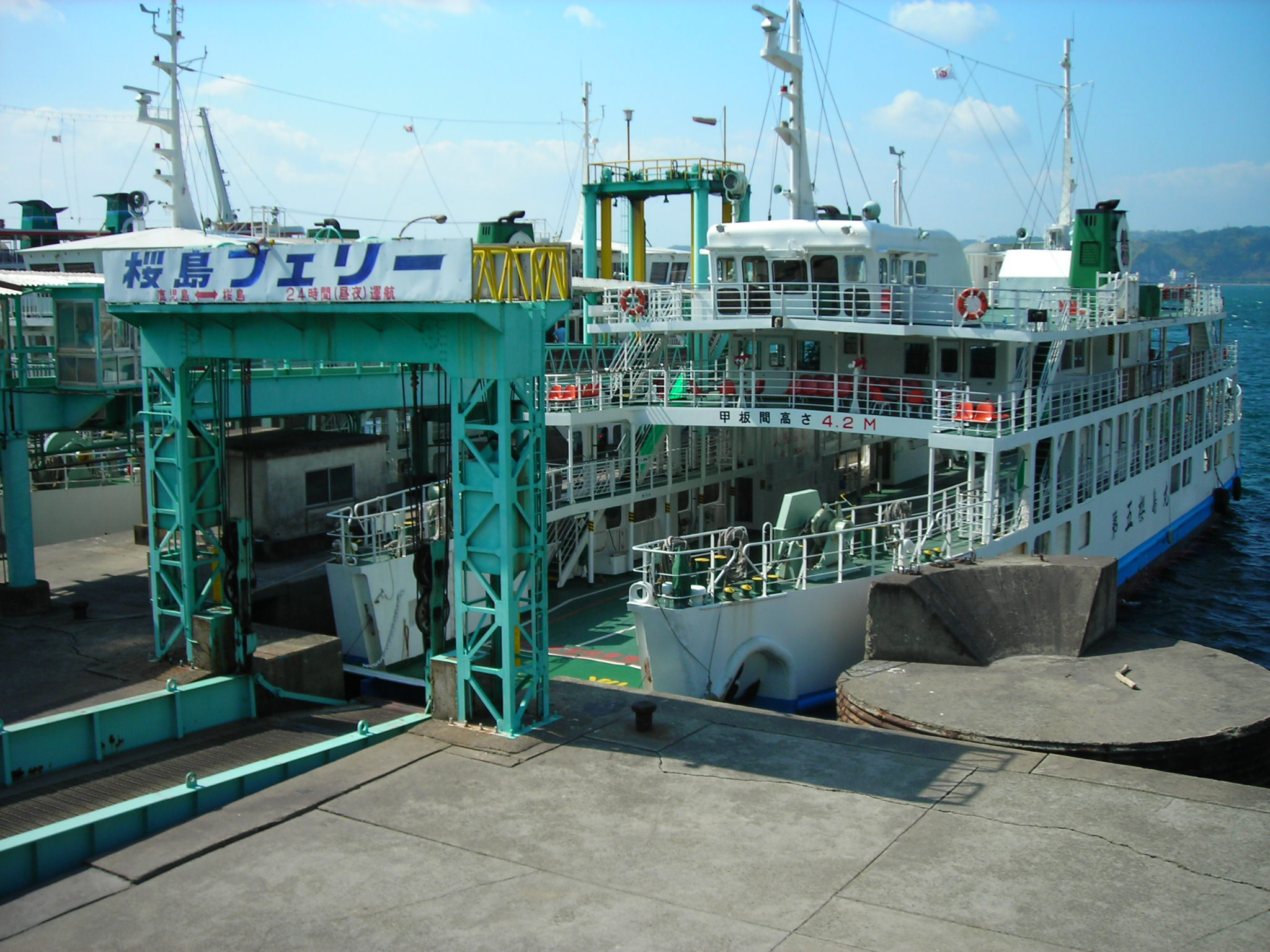 Sakurajima ferry (I think at Sakurajima port)